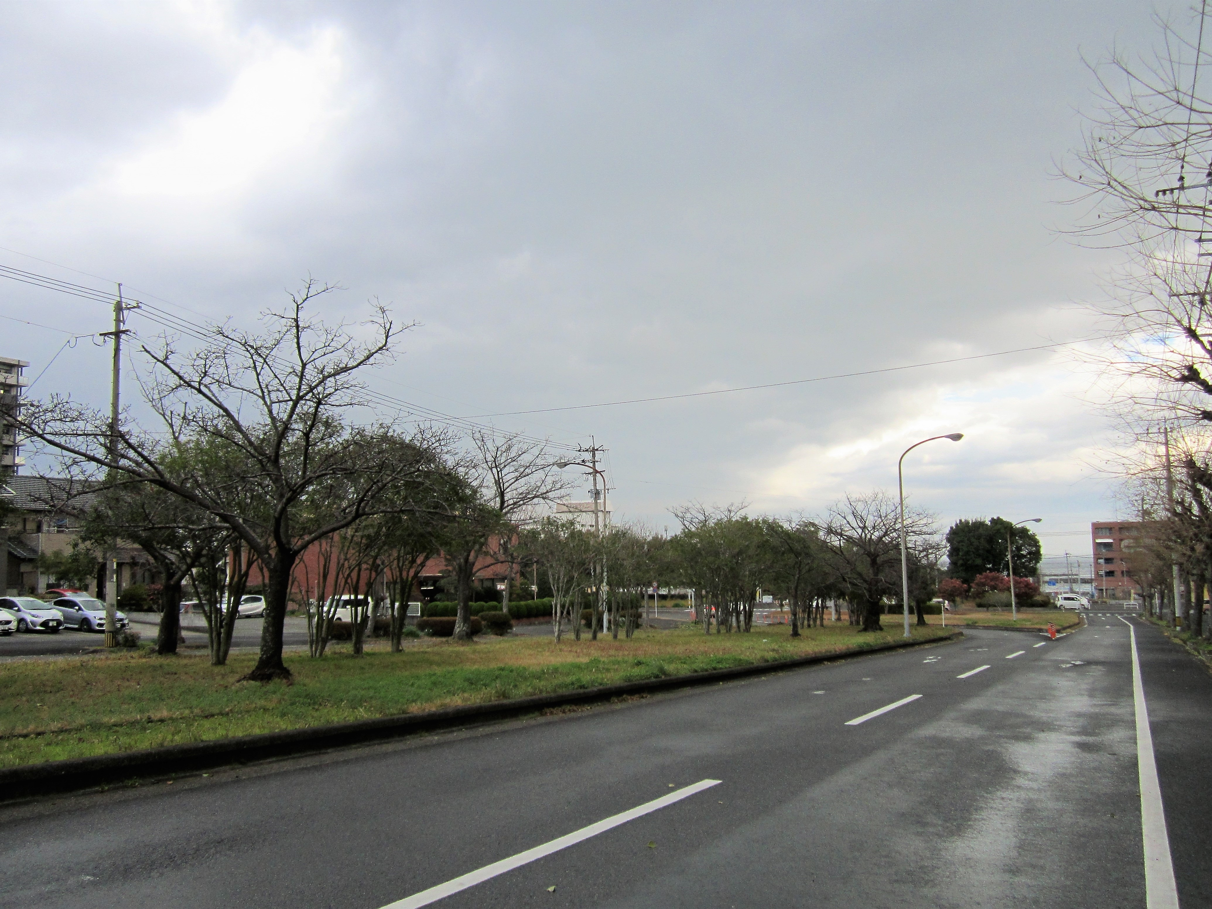 新別府駅予定地（山手側の中央分離帯がある道路） Canon PowerShot A2200